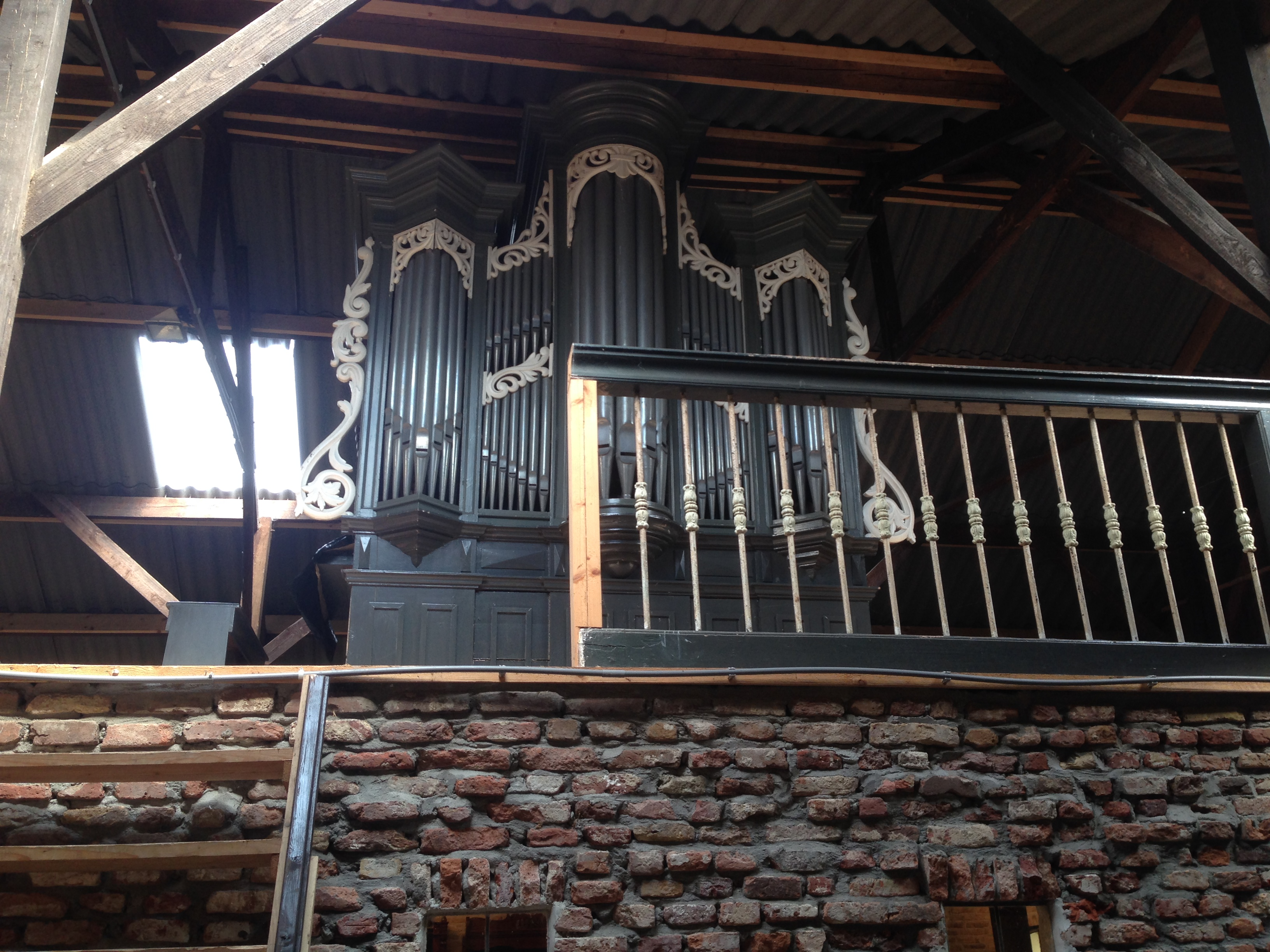 Harmonium Museum in Paasloo, Overijssel, Netherlands